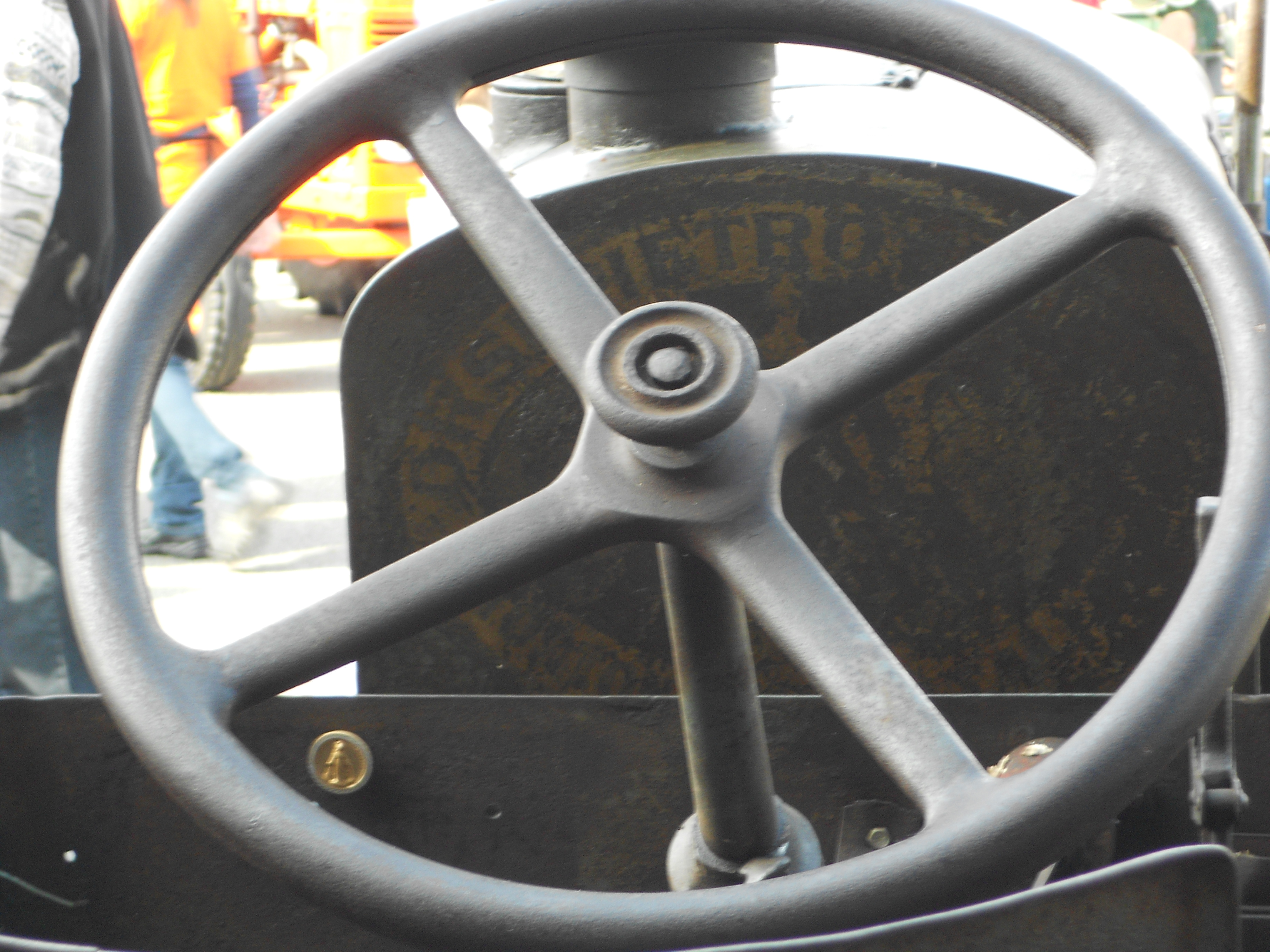 volante trattore a testa calda orsi